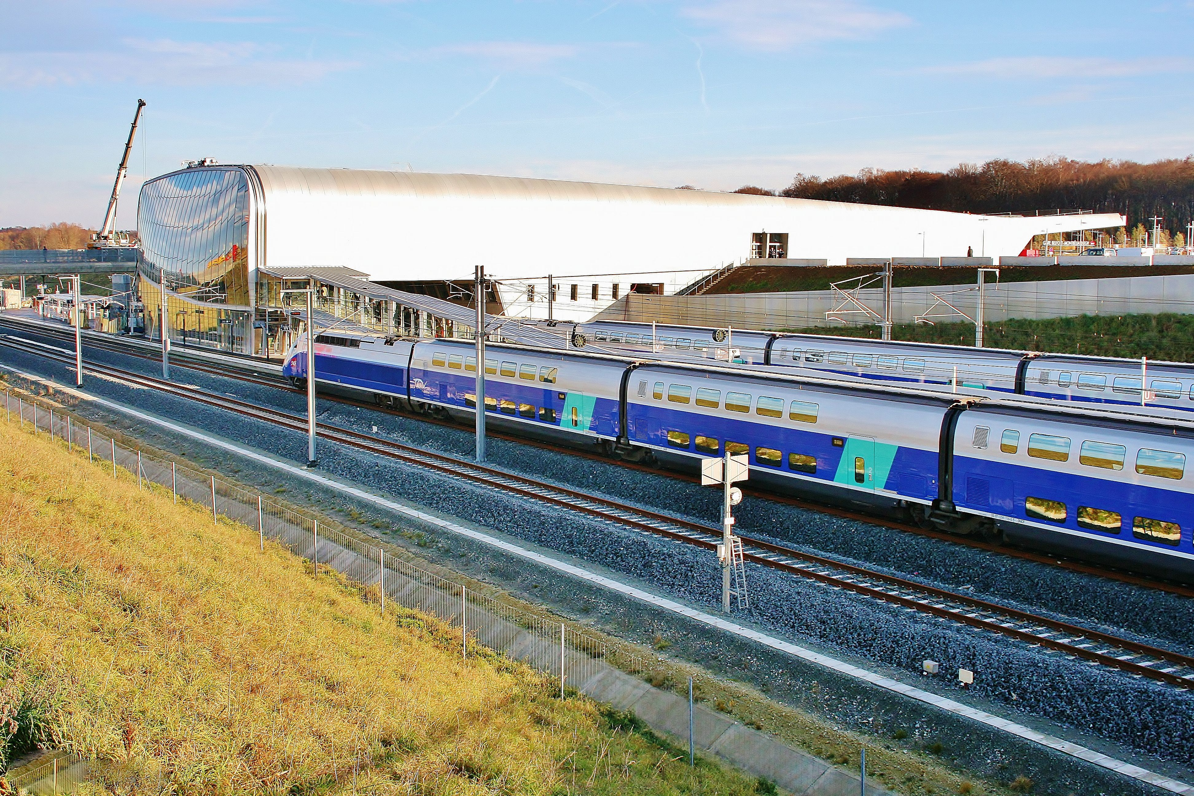 Inauguration de la nouvelle gare TGV. Moval, territoire de Belfort